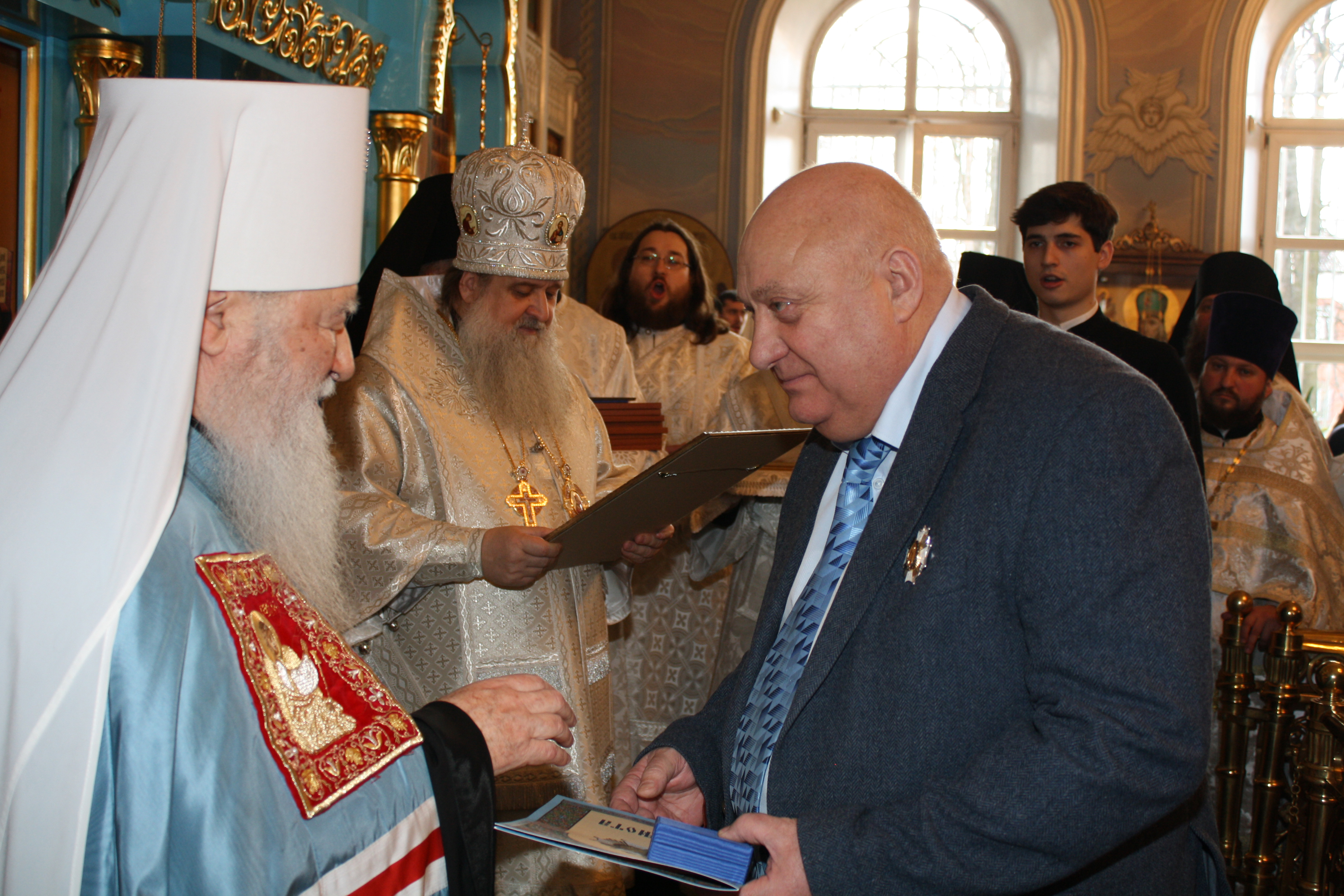 Митрополит Крутицкий и Коломенский Ювеналий вручает награду В. Стулову